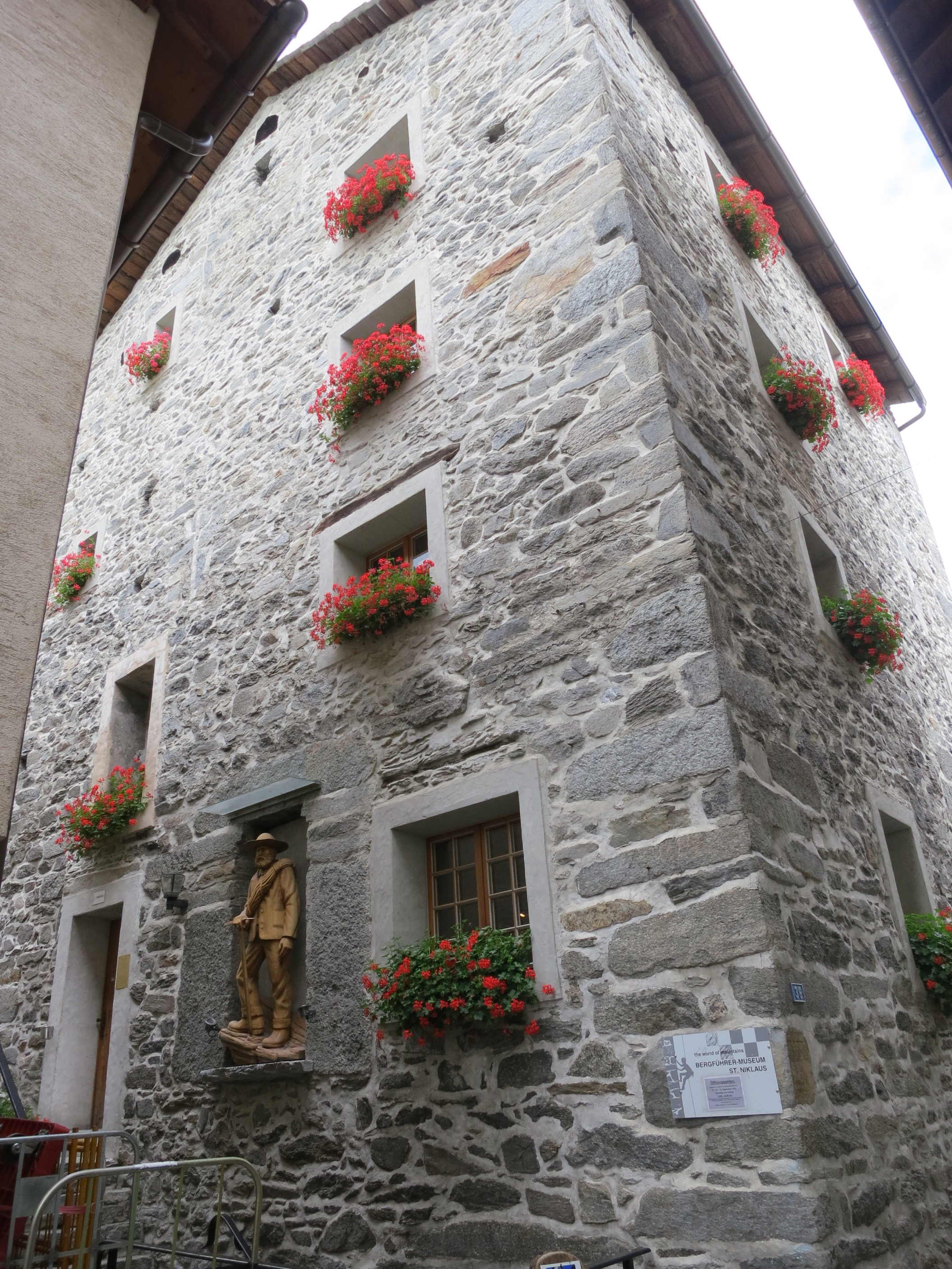 Meierturm, St. Niklaus VS, Schweiz